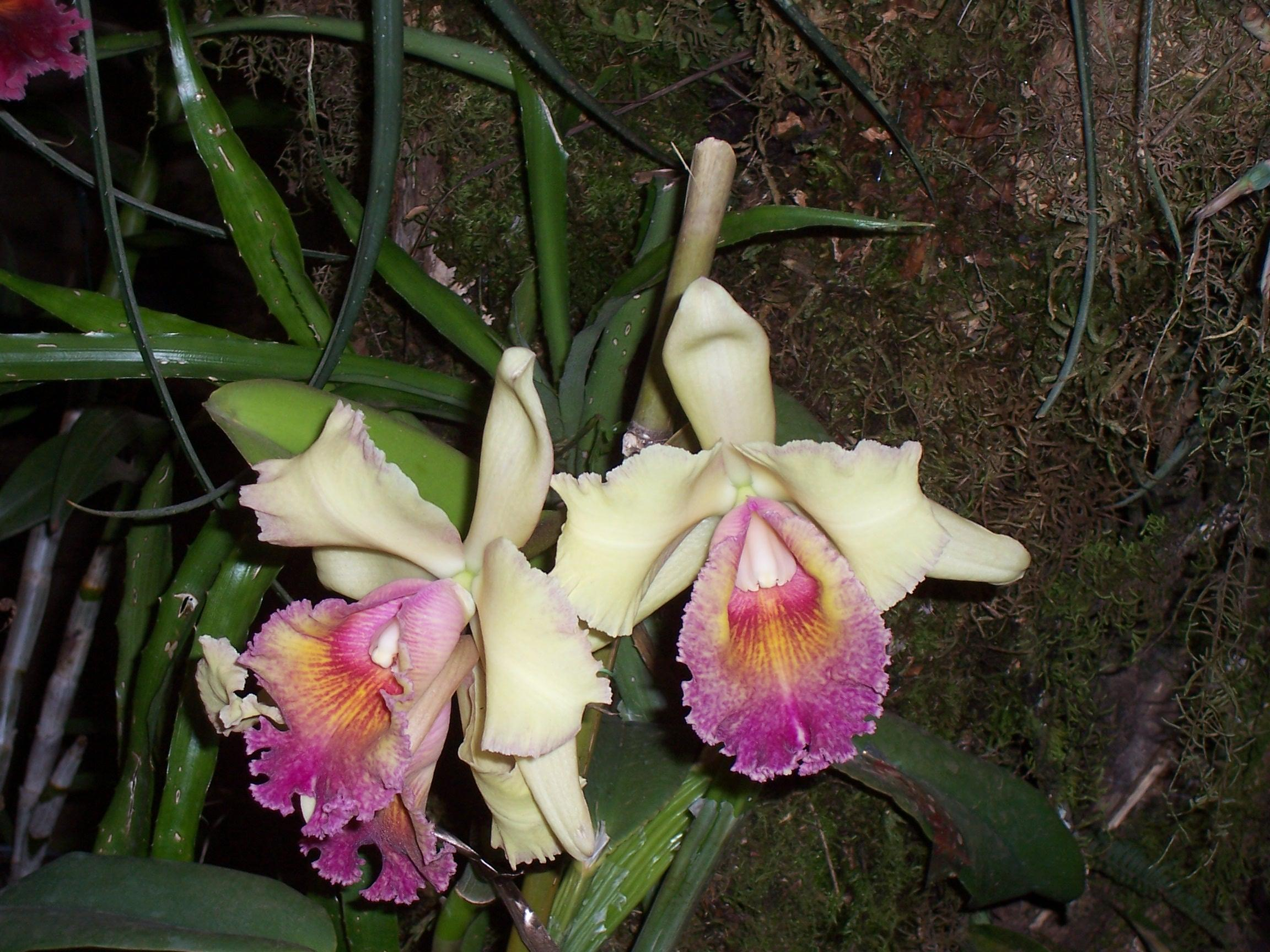 Cattleya cultivar, Orquedeas en la Fiesta Nac. del Inmigrante, Oberá (Argentina).